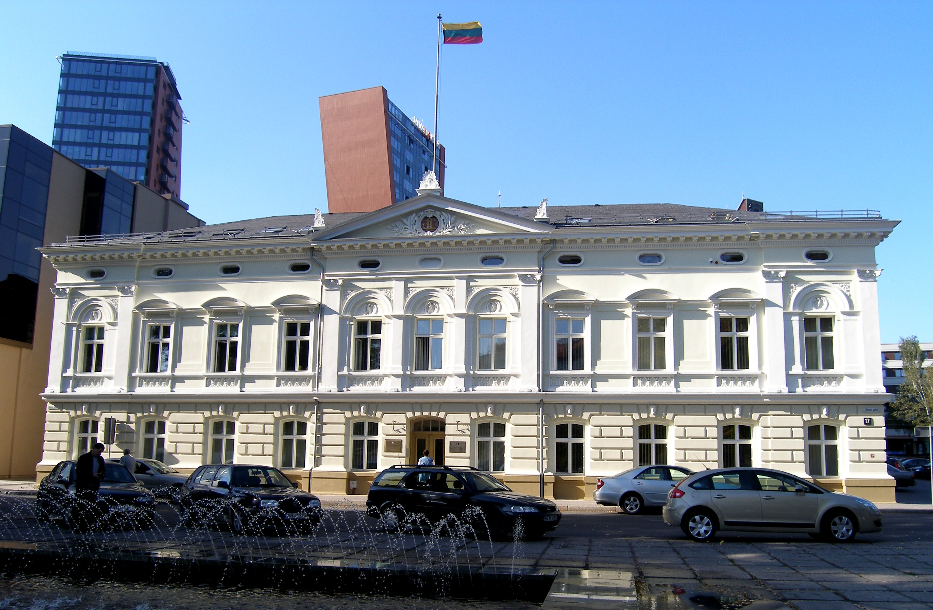 Klaipėdos rotušė